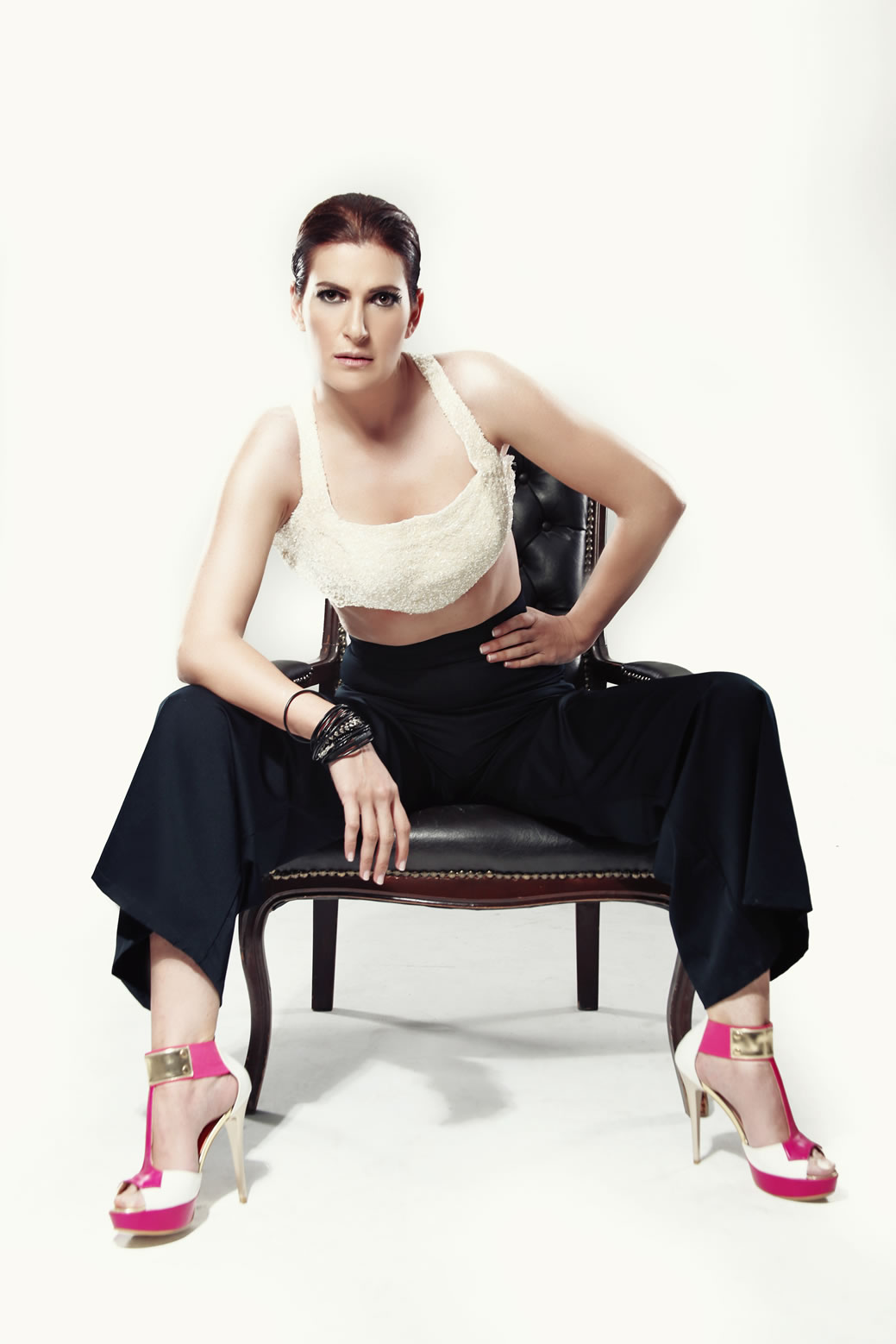 pınar soykan 2015